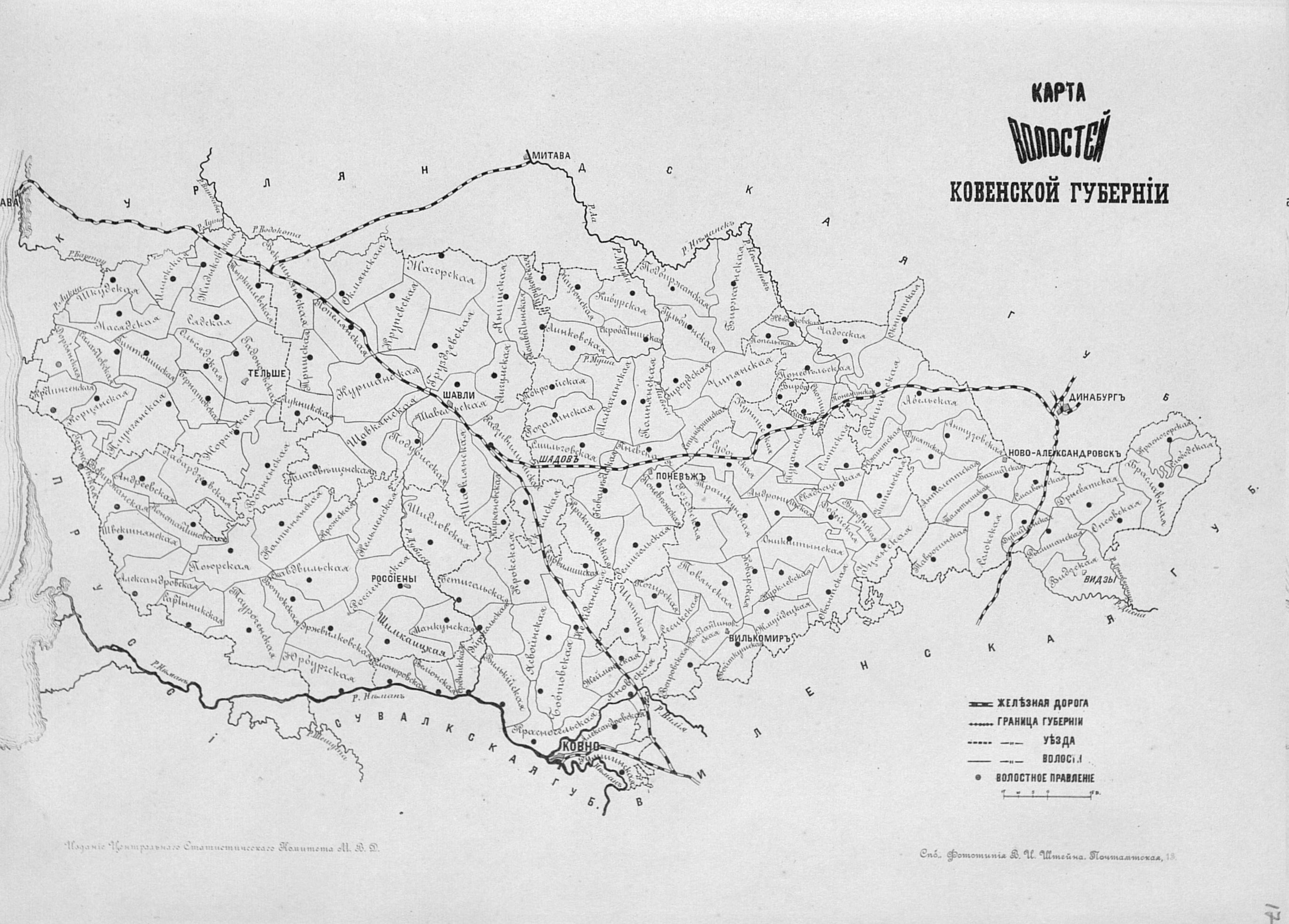 Карта волостей Ковенской губернии